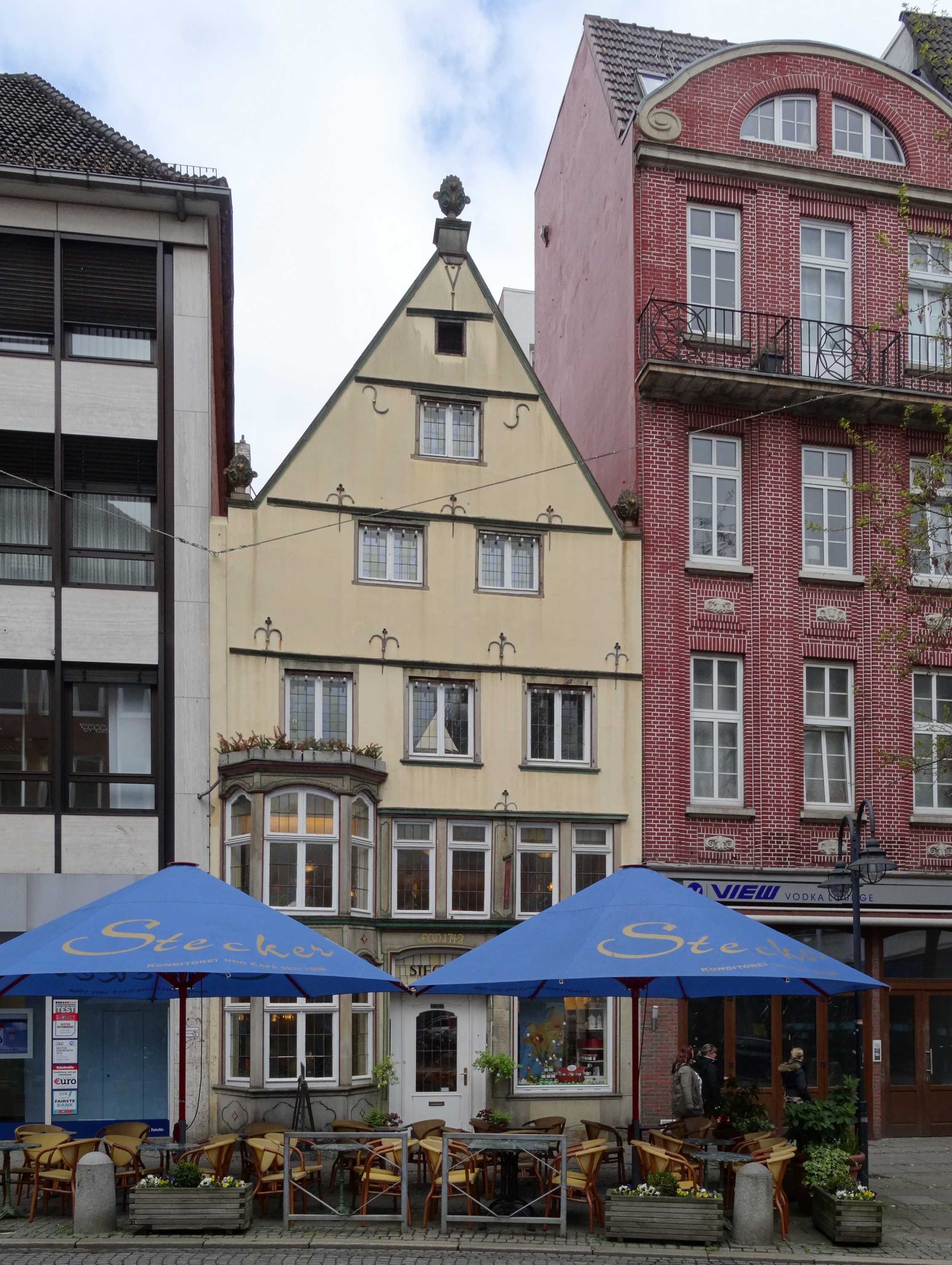 Café Stecker in Bremen, Knochenhauerstraße 14Das abgebildete Objekt ist ein geschütztes Kulturdenkmal in der Freien Hansestadt Bremen, mit der Nr. 0682 beim Landesamt für Denkmalpflege registriert.